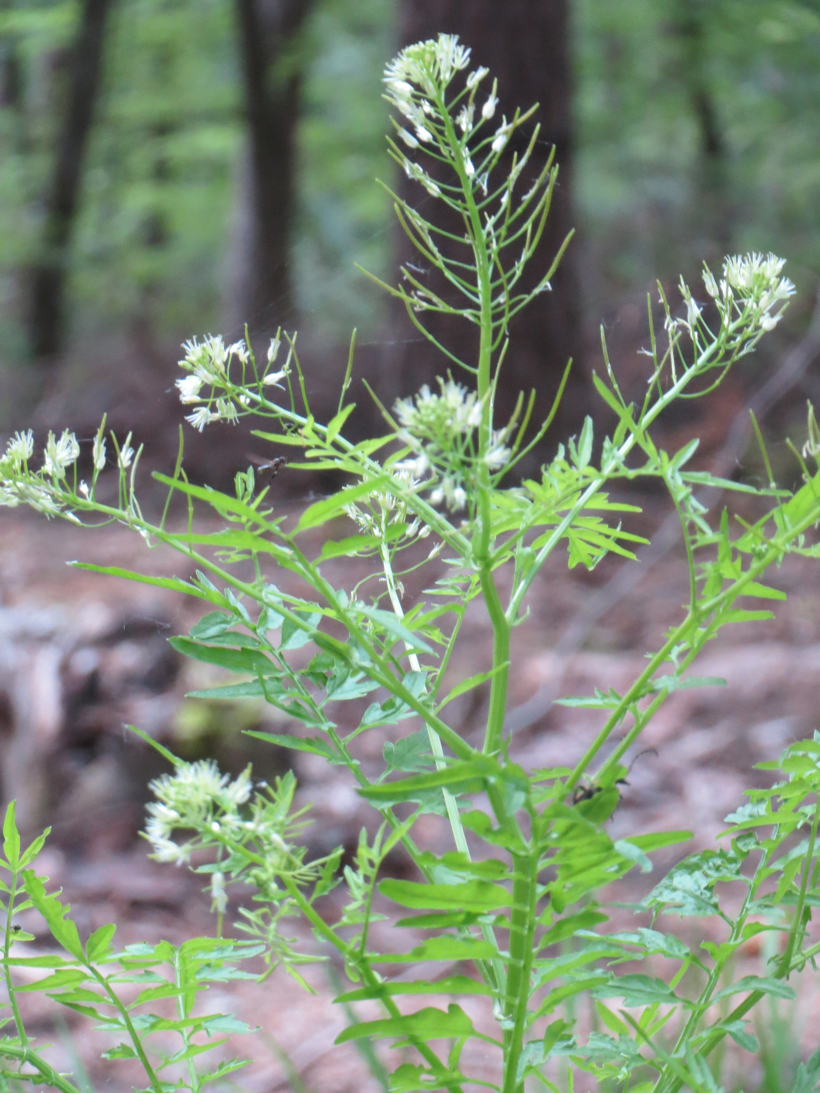 Spring-Schaumkraut (Cardamine impatiens) im Schwetzinger Hardt